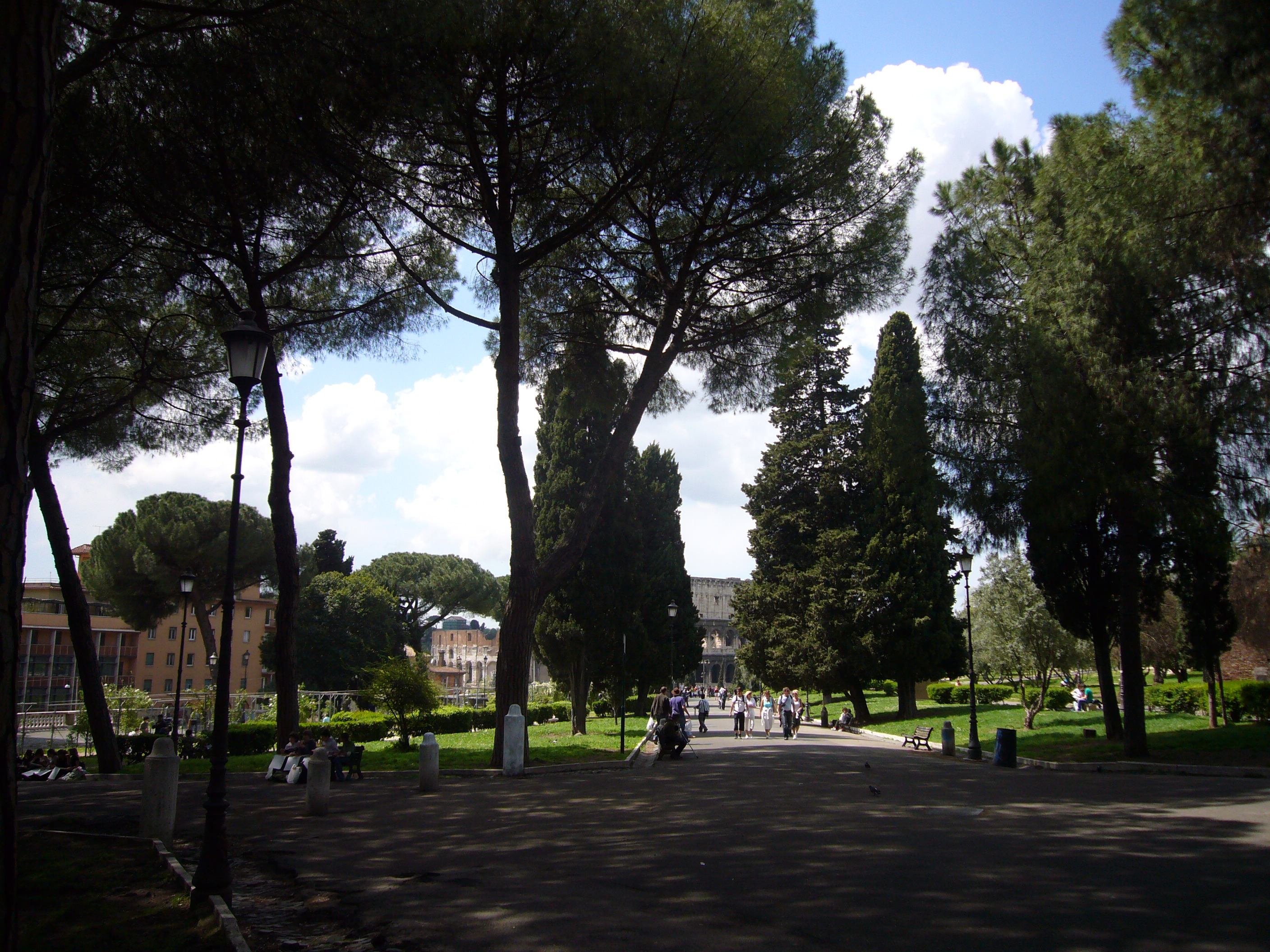 Roma, Colle Oppio verso il Colosseo